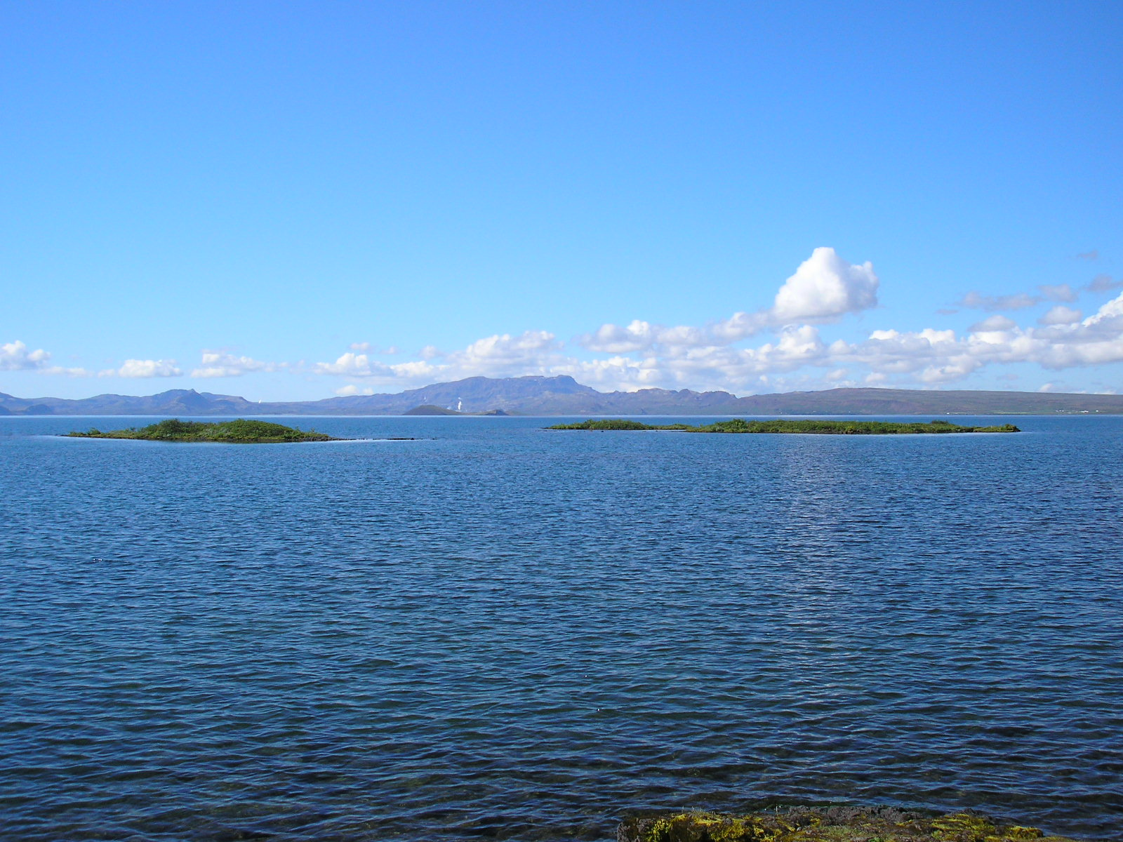 Þingvallavatn in Iceland.